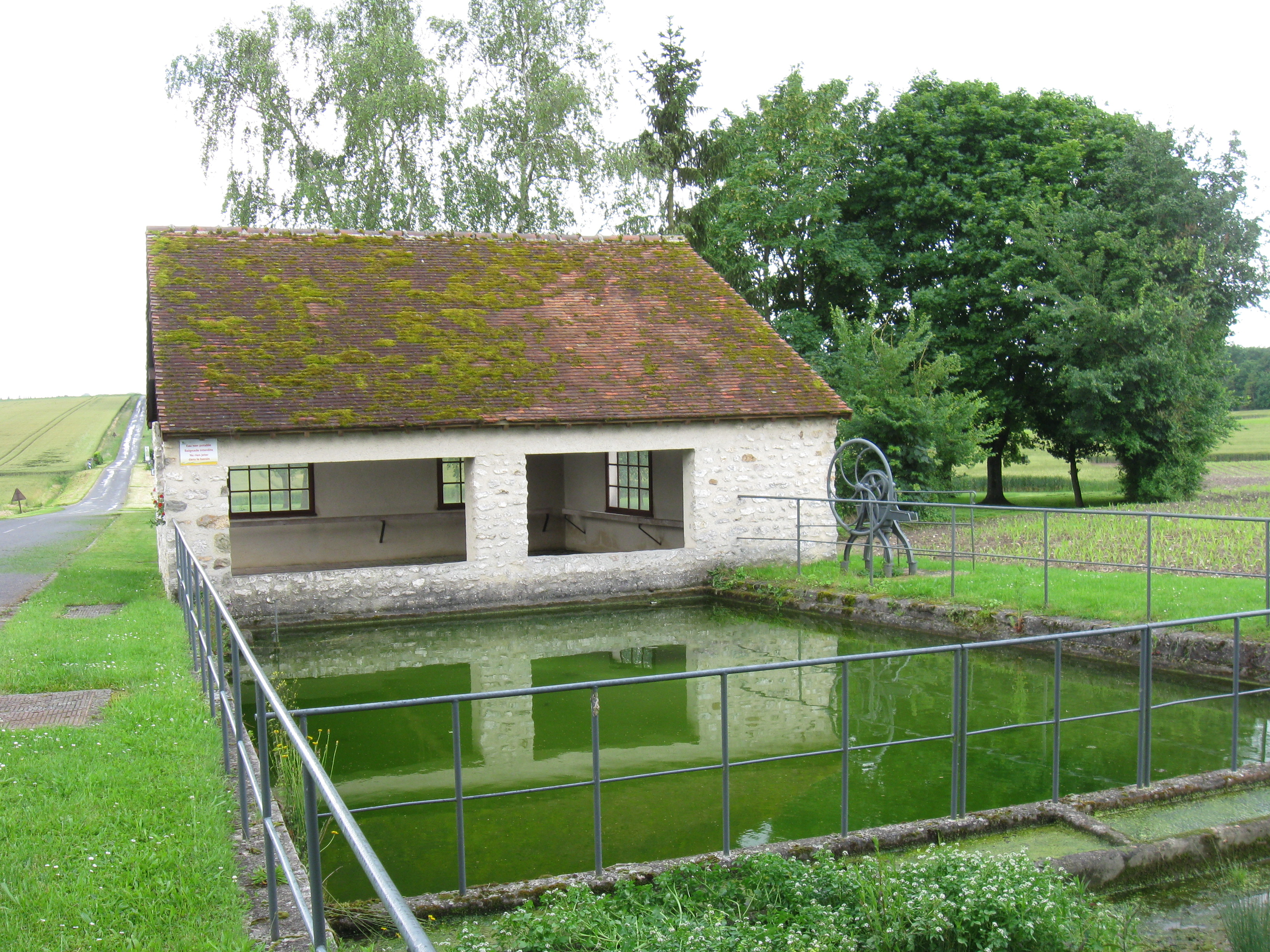 Lavoir de Boisdon. (Seine-et-Marne, région Île-de-France).